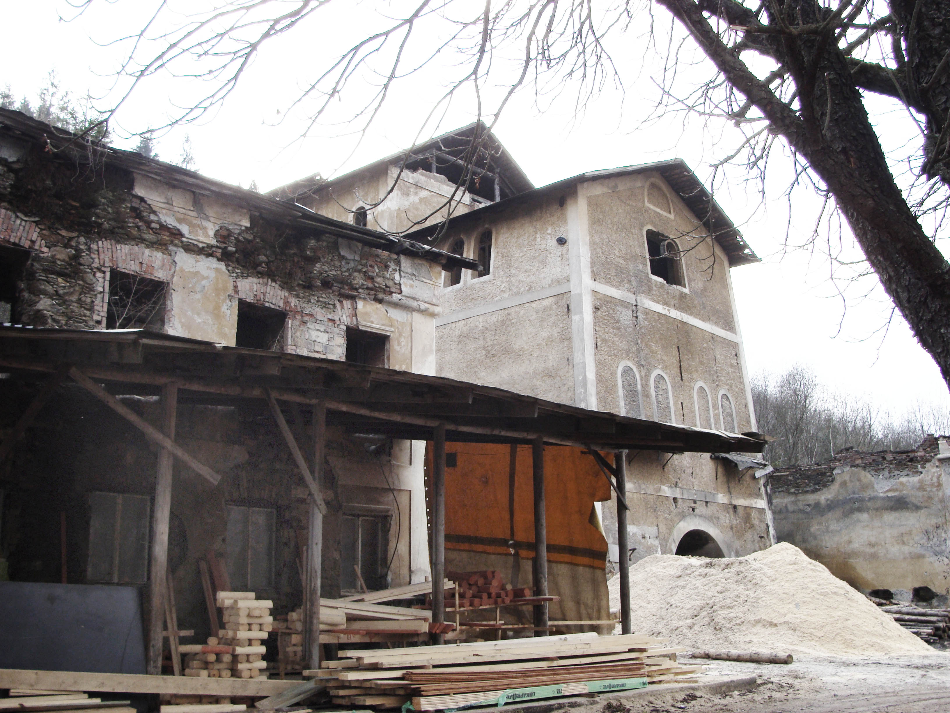 Objekt vysokej pece ja pamiatkovo chránenou stavbou vo vlastníctve Slovenského technického múzea v Košiciach. Napriek tomu chátra spolu s ostatnými objektmi. Po zastavení prevádzky v roku 1907 bola železiareň prebudovaná na pražiarenský závod prípravy rúd.